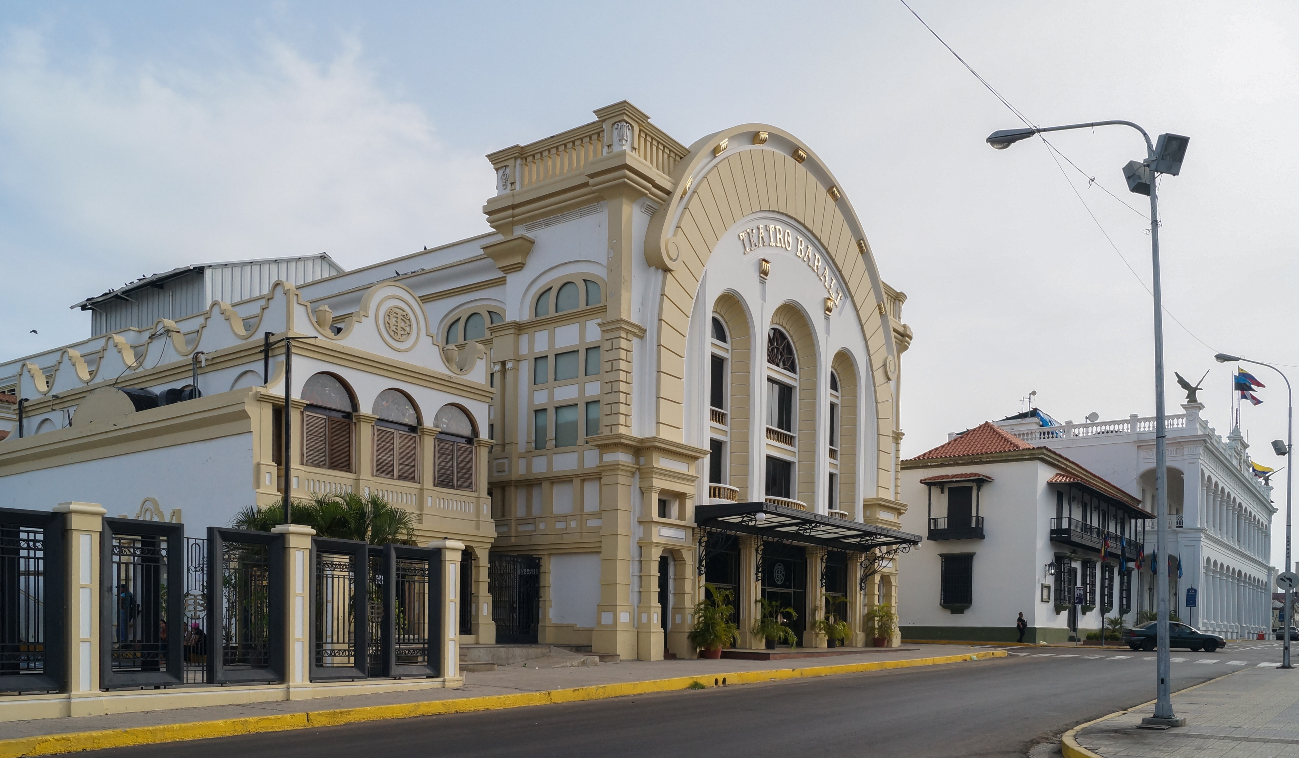 Teatro Baralt